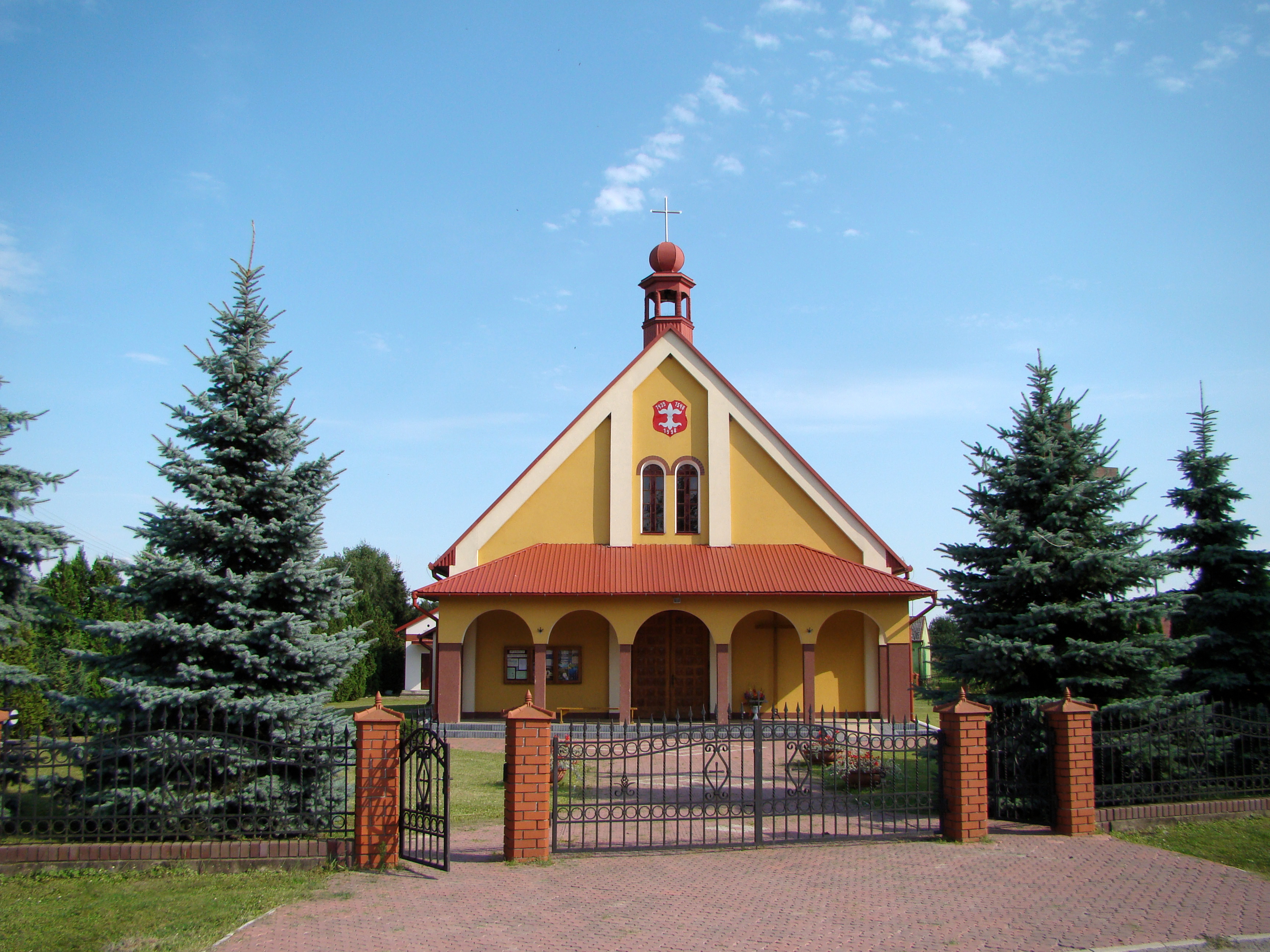 Kostel Boží milosti ve vesnici Gozdów, Polsko